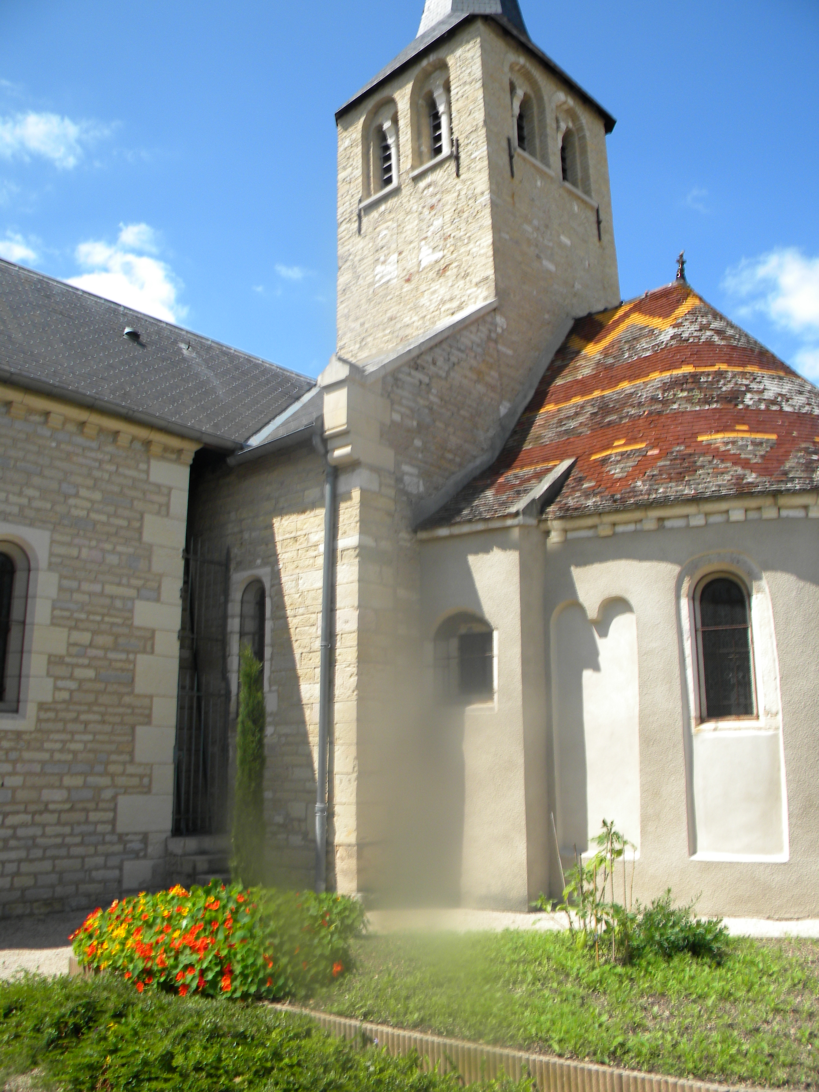 Bretenière